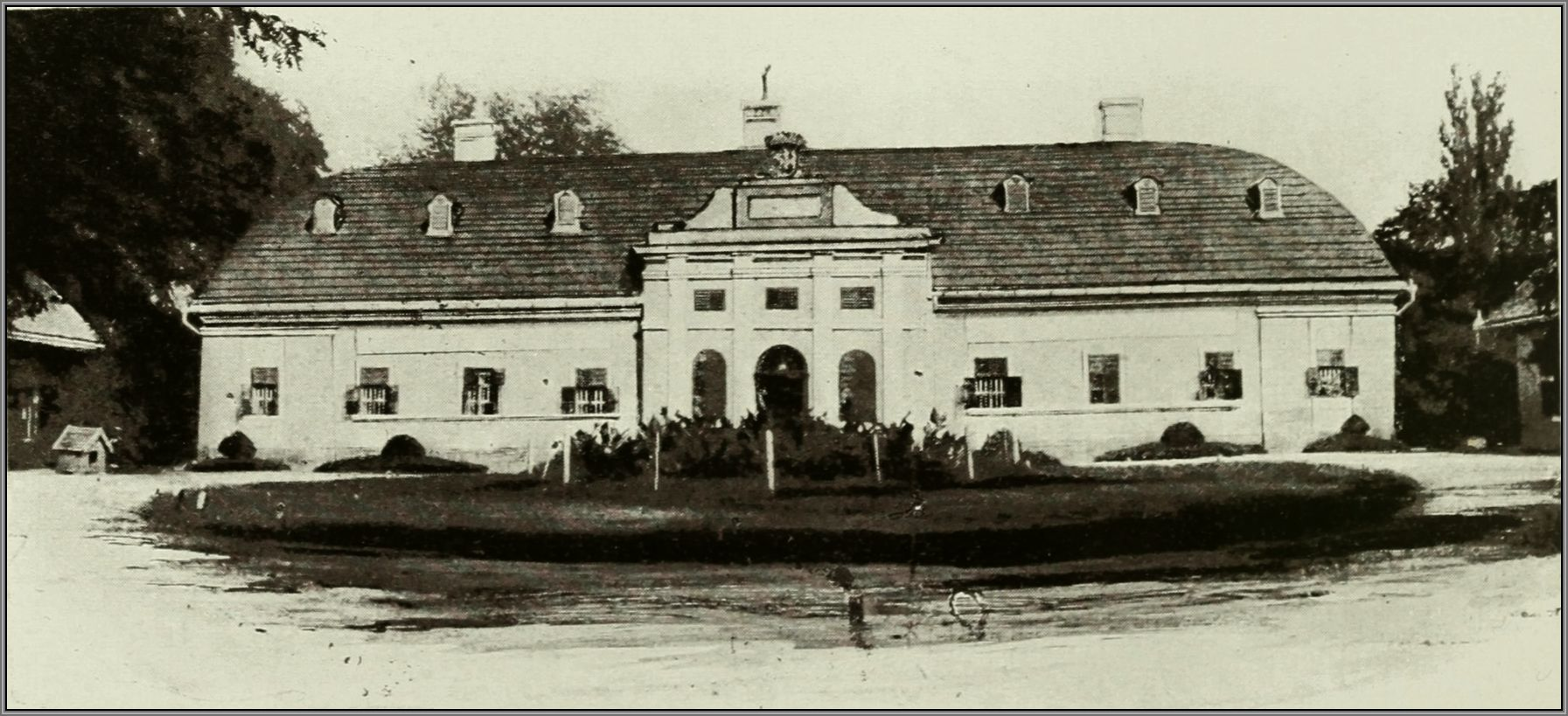 Báró tótprónai és blatnicai Prónay József (Romhány, 1821 – Budapest, 1884. május 16.) magyar politikus, államtitkár kúriája a Nógrád vármegyei Romhányban.